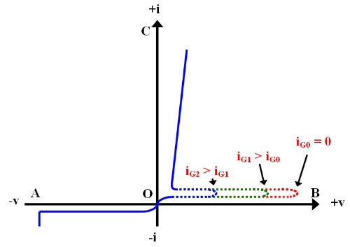 Caracteristiques thyristor